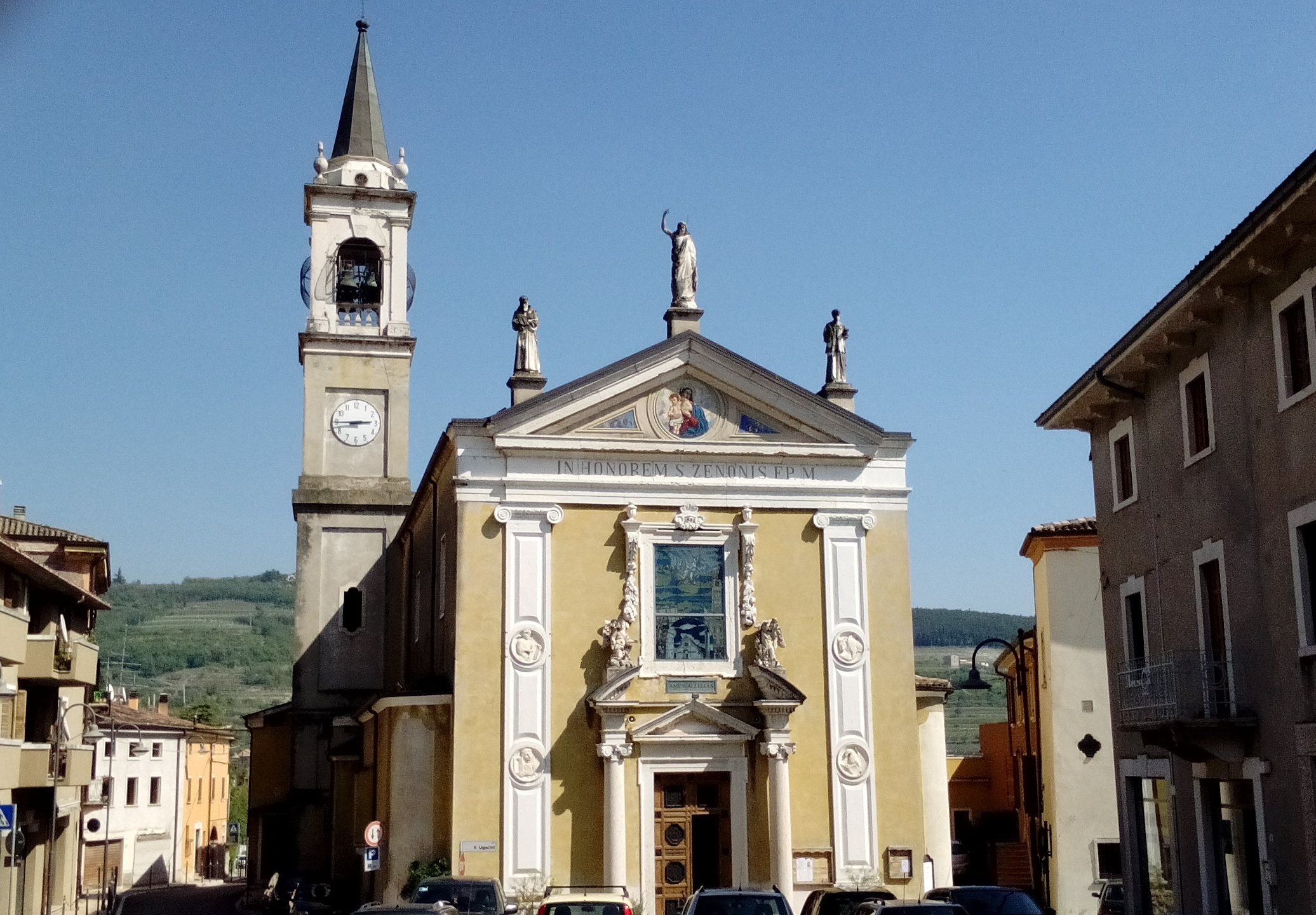 Facciata della chiesa parrocchiale di Fumane, provincia di Verona.